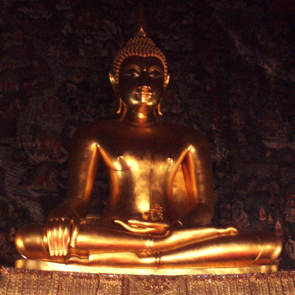 Buddha Statue in Wat Suthat, Bangkok, Thailand